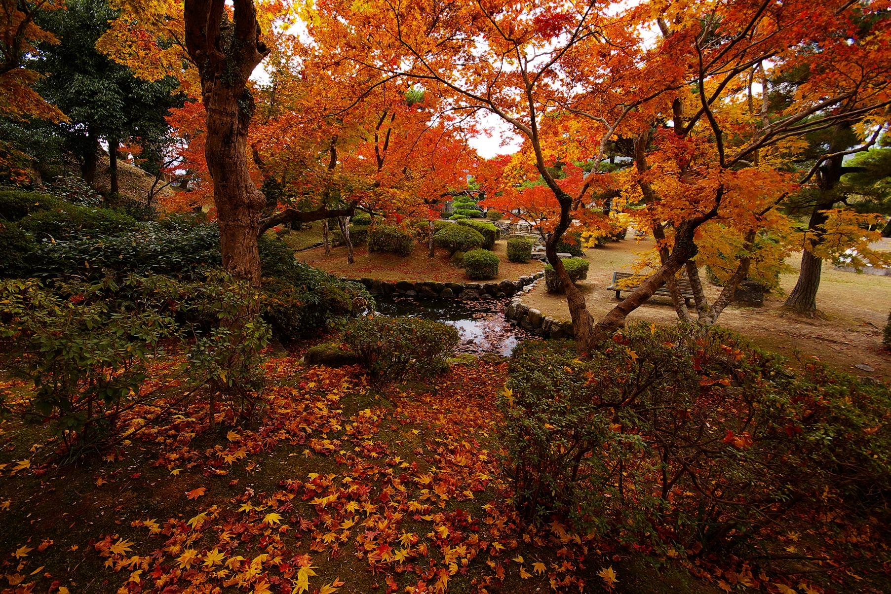 西渓公園